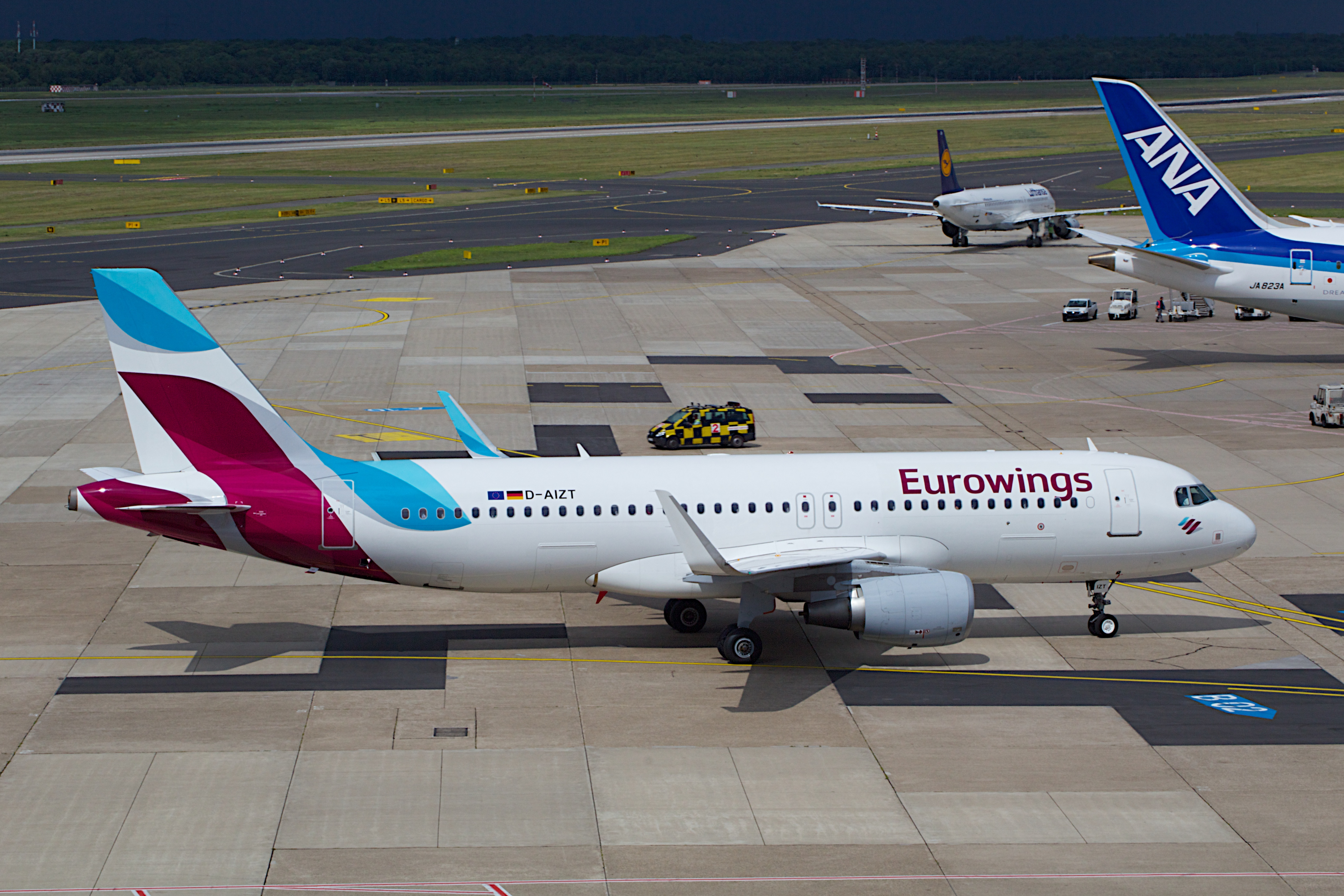 Dusseldorf Airport.